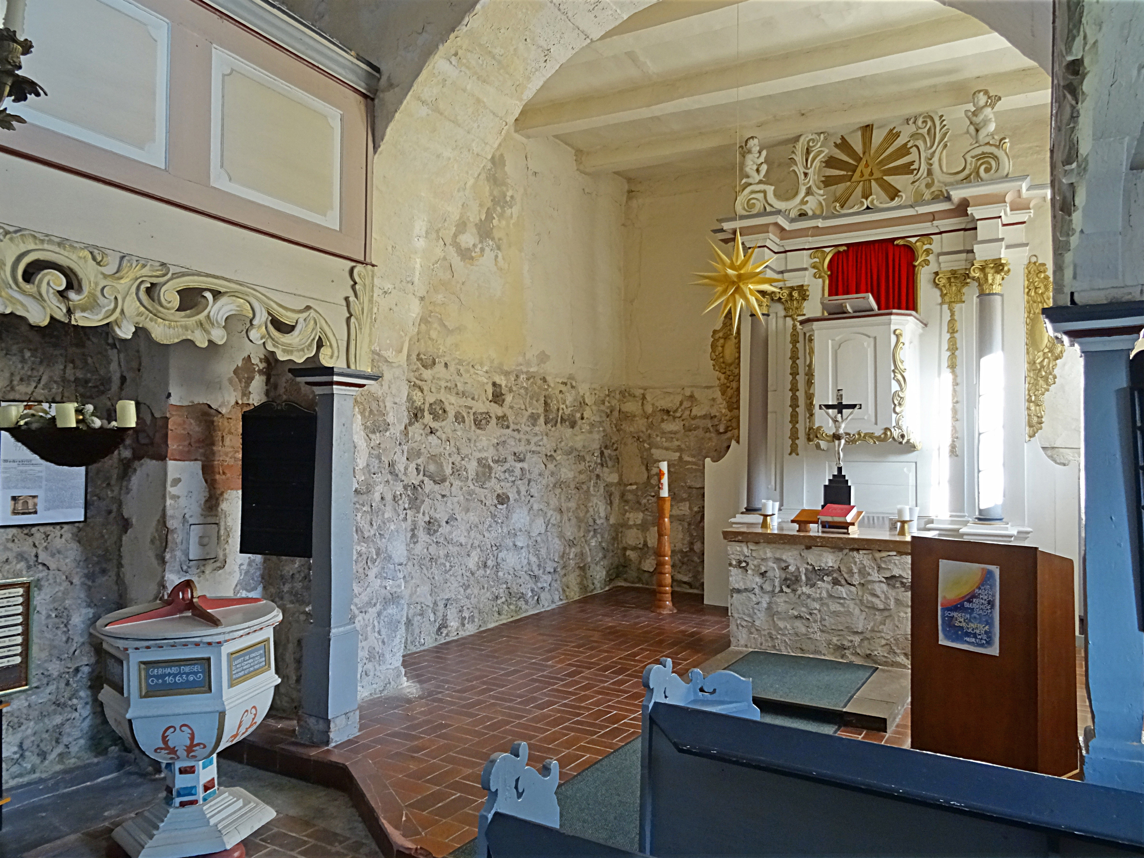 Nicolaikirche Krimderode